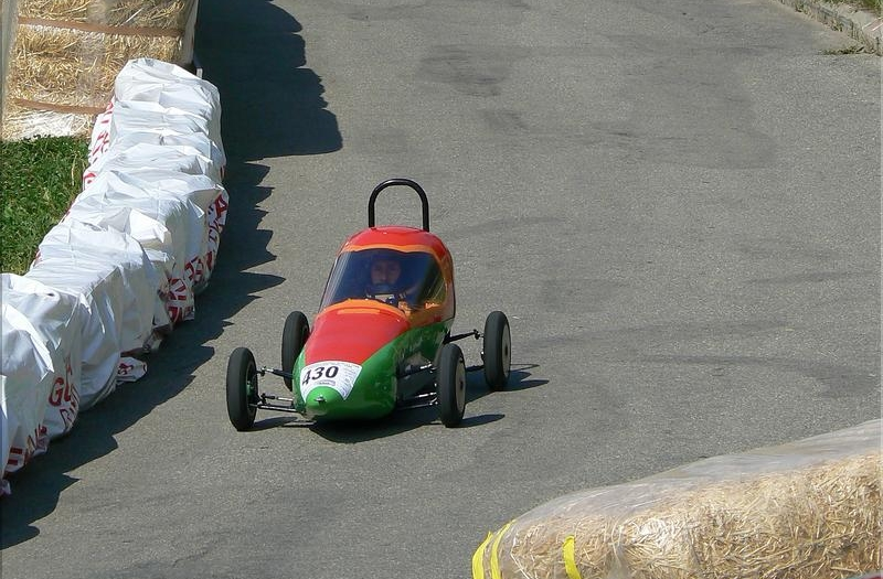 Voici une Caisse à Savon francaise categorie C4 Sport monoplace